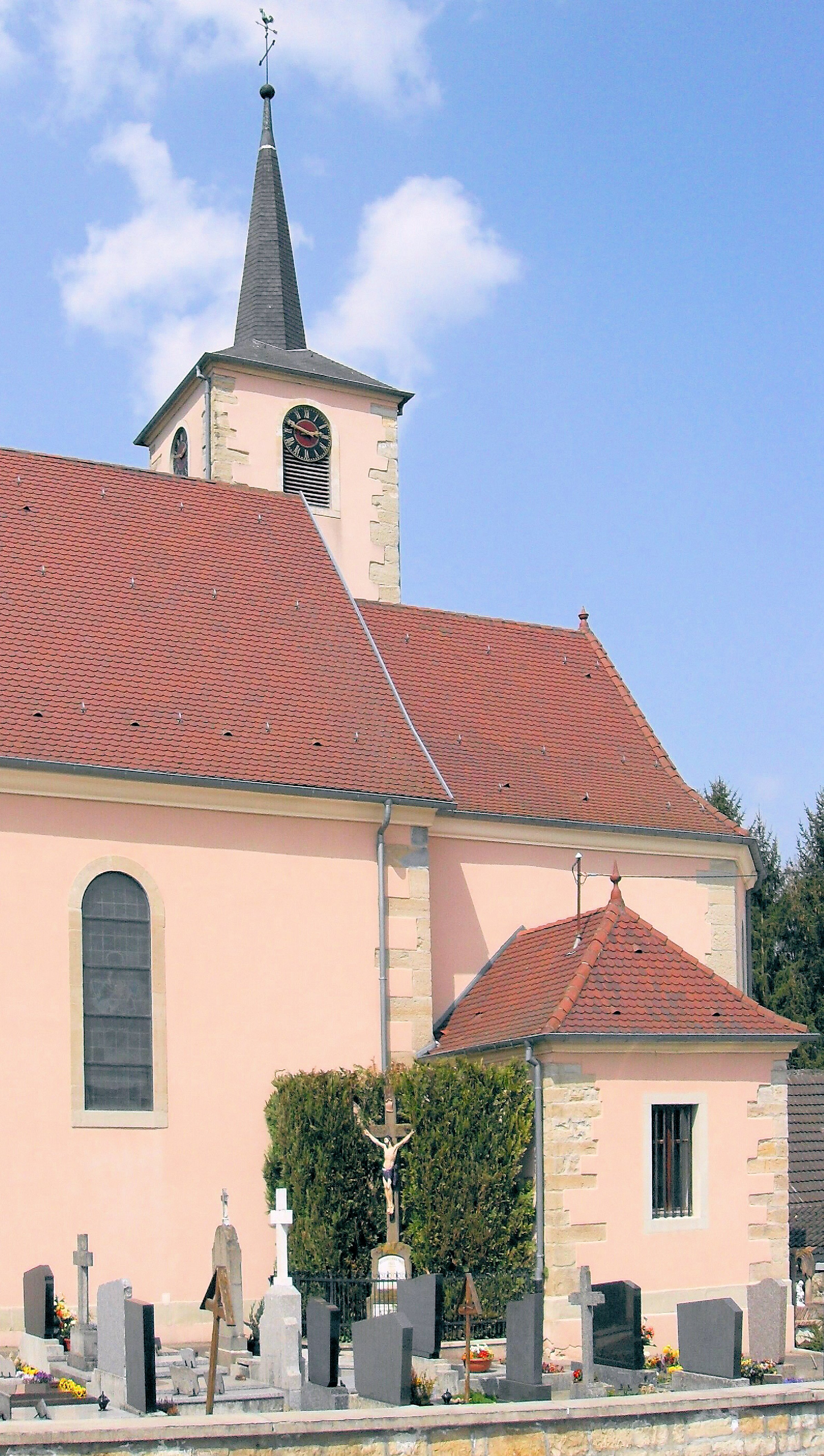 L'église Saint-Imier à Berentzwiller